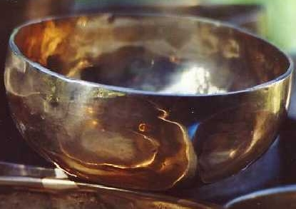 Klankschaal uit Nepal. Dia Kodakcolor 200ISO. Auteur: Geert Verbeke. Gebruiksrecht gegeven aan Wikipedia.NL categorie:afbeelding muziekinstrument